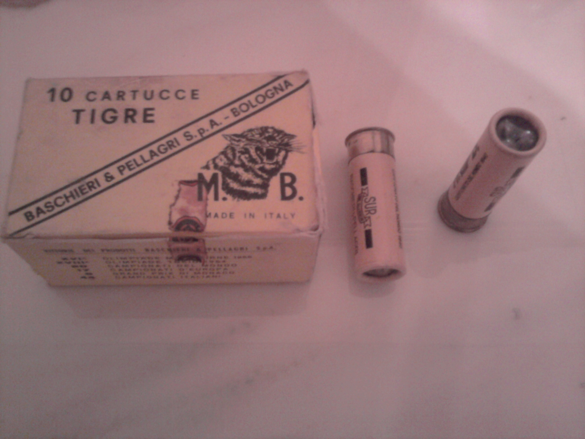 Cartucce mie legalmente detenute